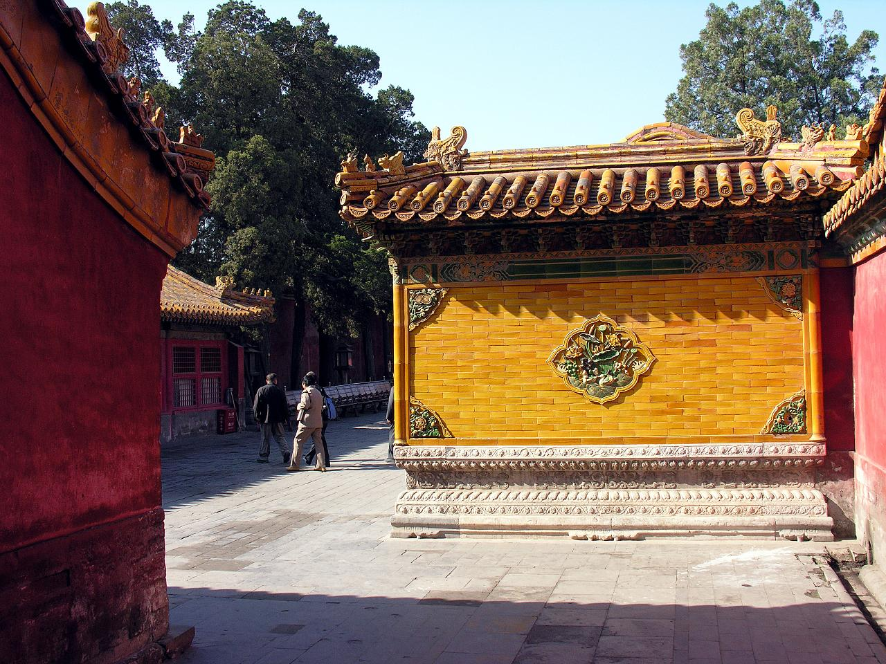 China-6235